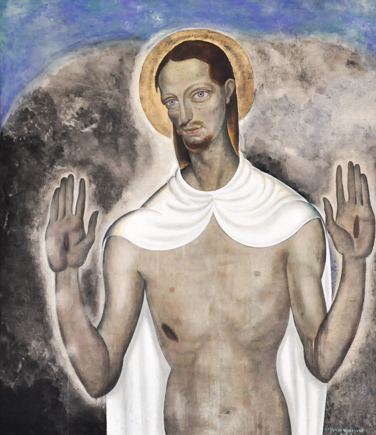 Gustave Van de Woestyne (1881-1947) Christus toont zijn wonden (1921) MSK Gent